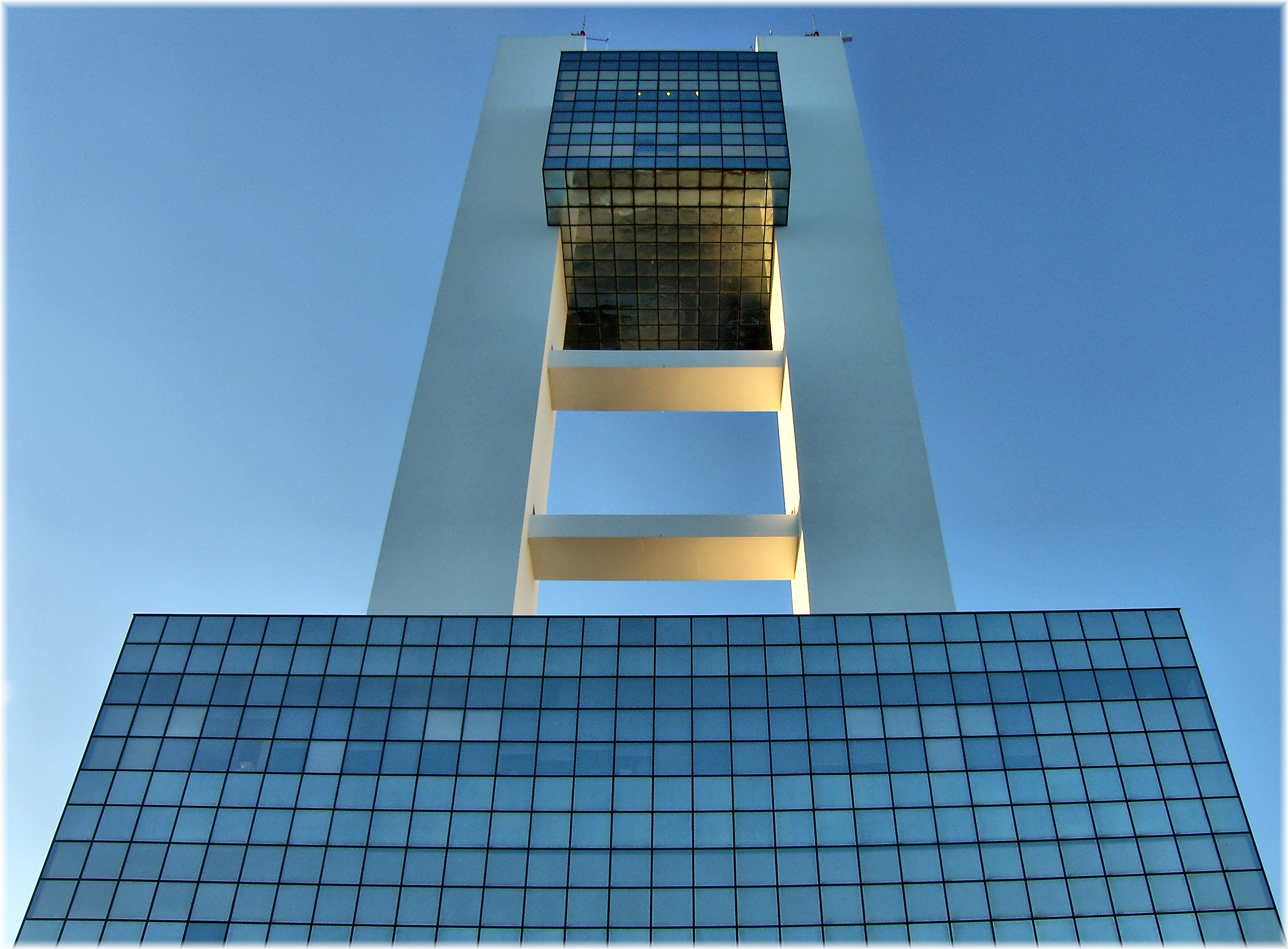 La Torre de control marítimo de A Coruña está situada en el dique de abrigo del puerto de A Coruña y en ella se encuentra el centro de coordinación de salvamento marítimo de A Coruña además de la dirección general de marina mercante y la capitanía marítima de La Coruña. Con una altura de 80 metros se ha convertido en parte del entorno de Coruña ya que se vé desde distintos puntos de la ciudad y forma parte del paseo marítimo junto con otros lugares emblemáticos como el castillo de San Antón o la Torre de Hércules.